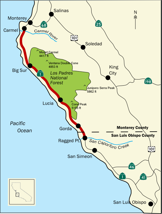 Description Kaart van California's Big Sur gebied, gebaseerd op kaart van User:Howcheng, met bergen en rivieren ingetekend. Date27 July 2006Sourcezelfgemaakt m.b.v. publiek domein afbeeldingen.AuthorUser:ScooterbossPermission (Reusing this file) Publiek domein Kaart van California's Big Sur gebied, gebaseerd op kaart van User:Howcheng, met bergen en rivieren ingetekend.